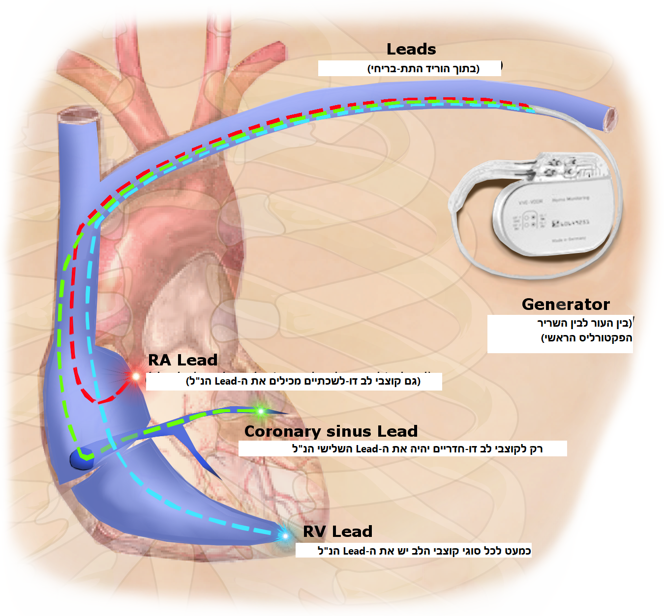 הדגמה של קוצב לב מושתל שמראה את מיקומי החוטים המוליכים של קוצב הלב